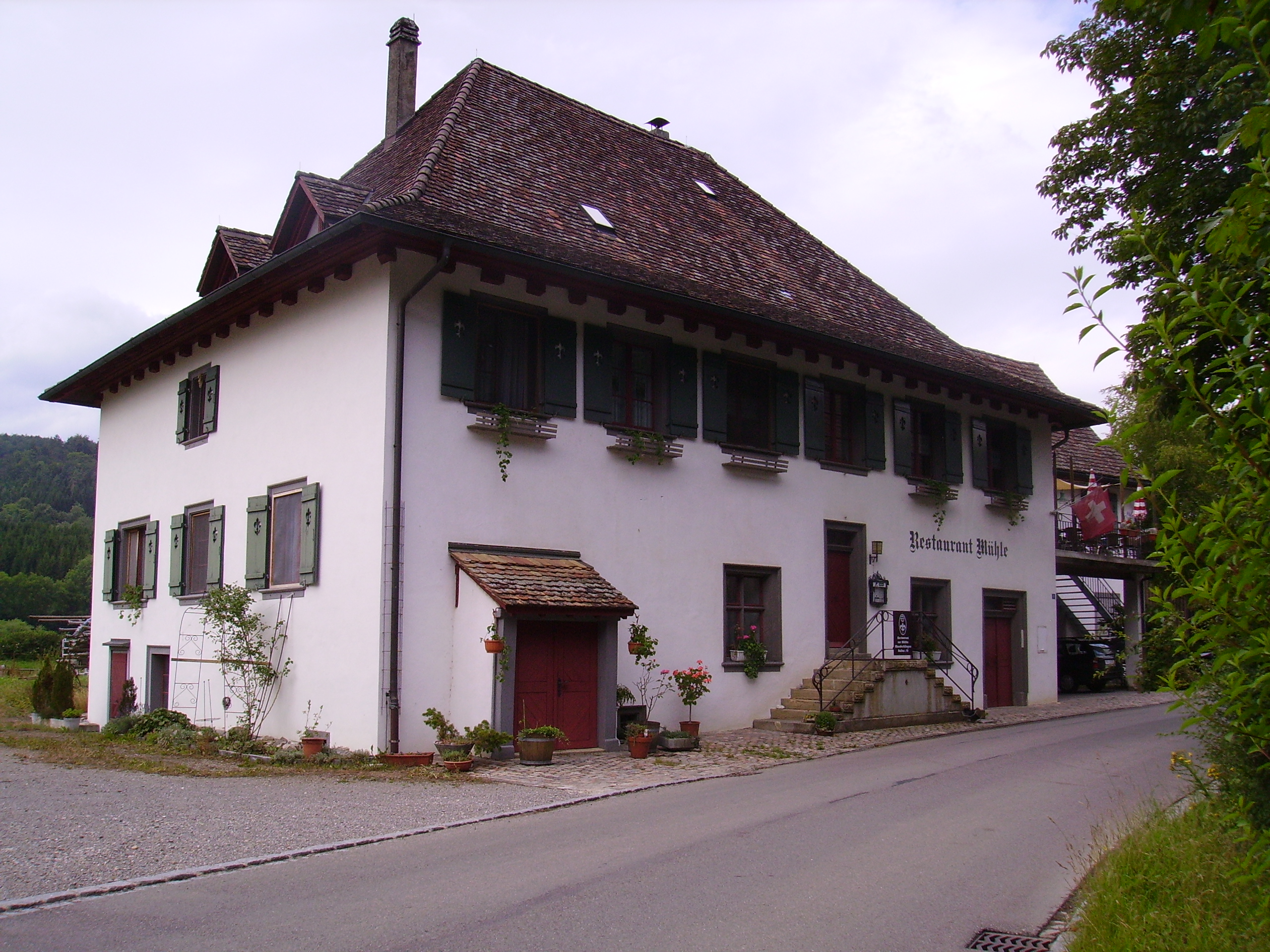 Die ehemalige Mühle in Wunderklingen, Hallau, Kanton Schaffhausen, erbaut 1821, fotografiert aus südwestlicher Richtung.